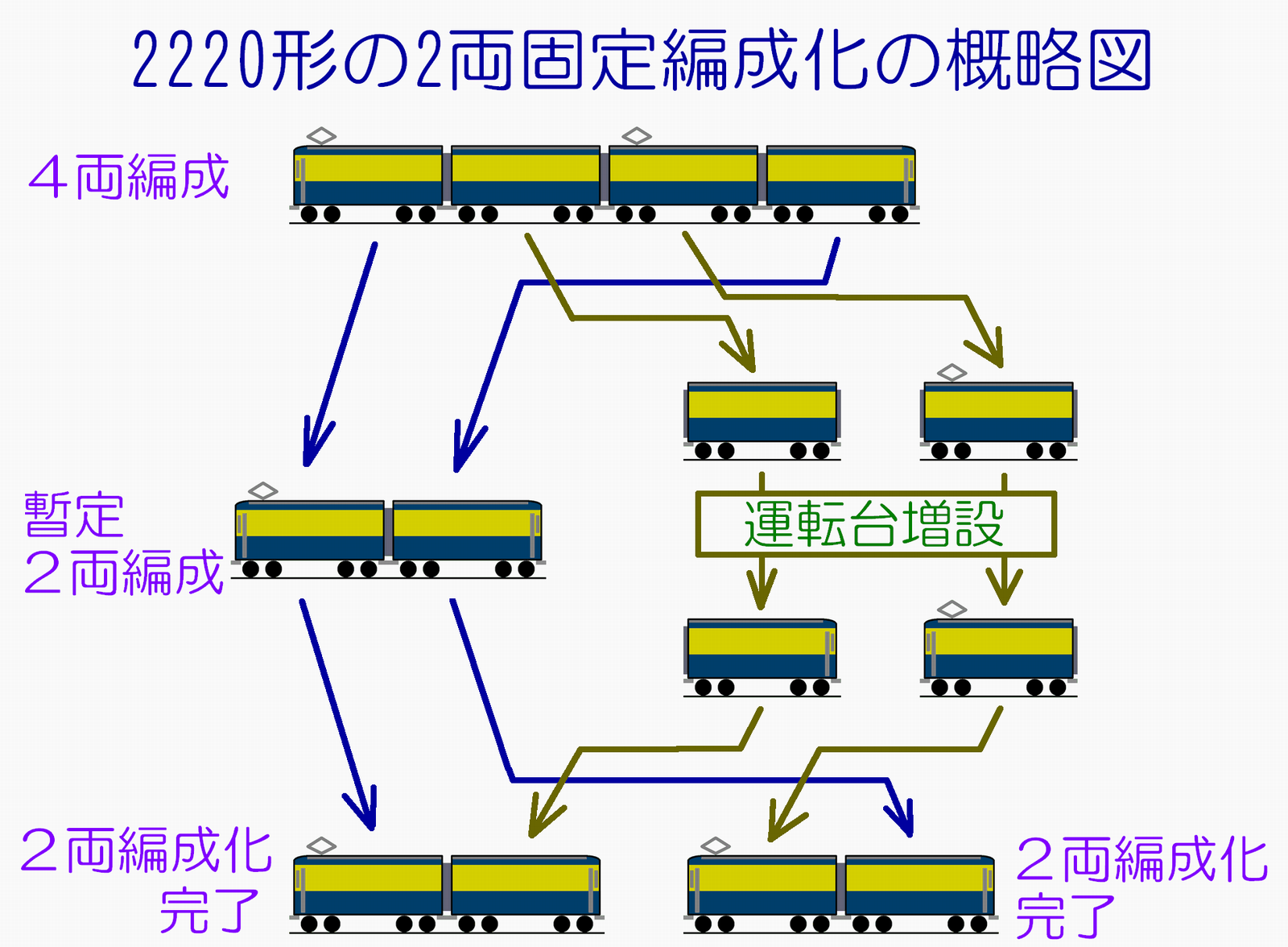 小田急電鉄2220形の組成変更を示した図